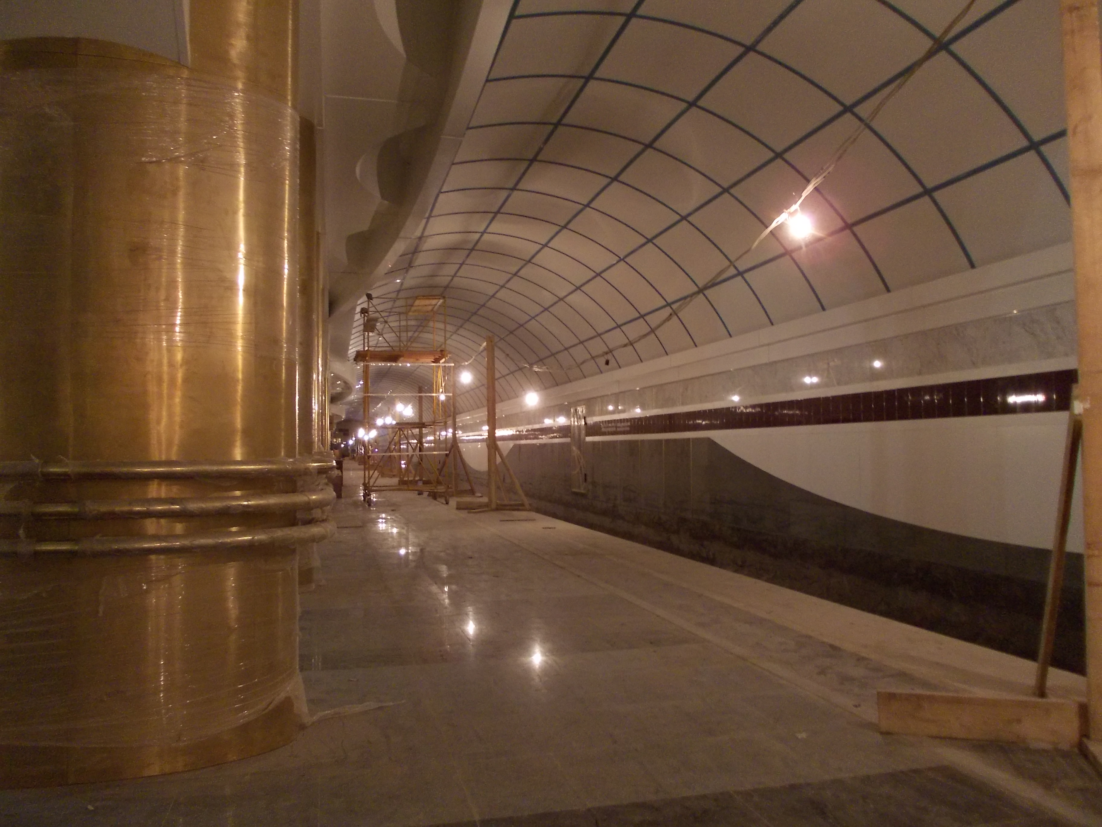 Платформа станции метро Международная во время строительства.